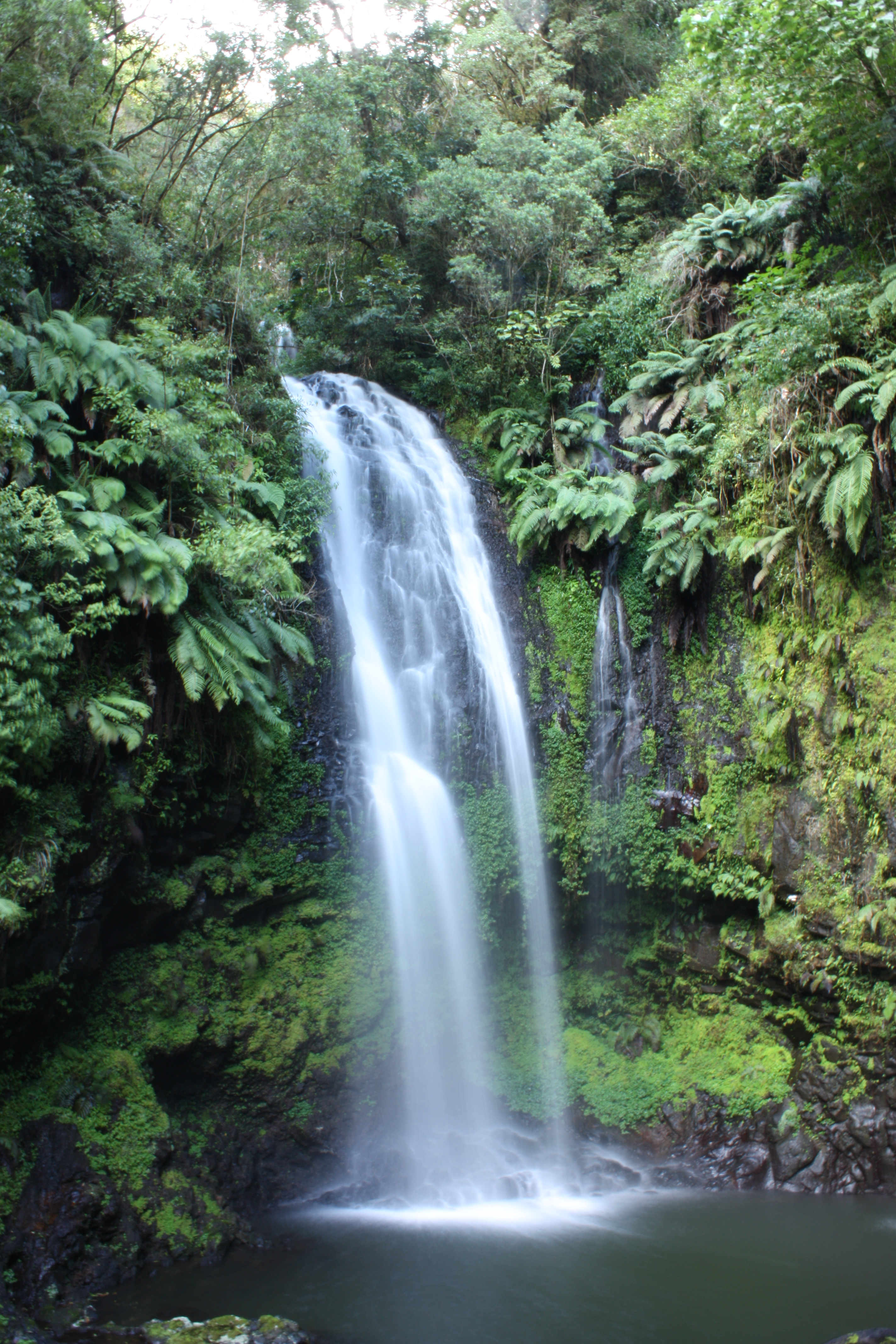 Waterfall in Montagne d'Ambre, N Madagascar